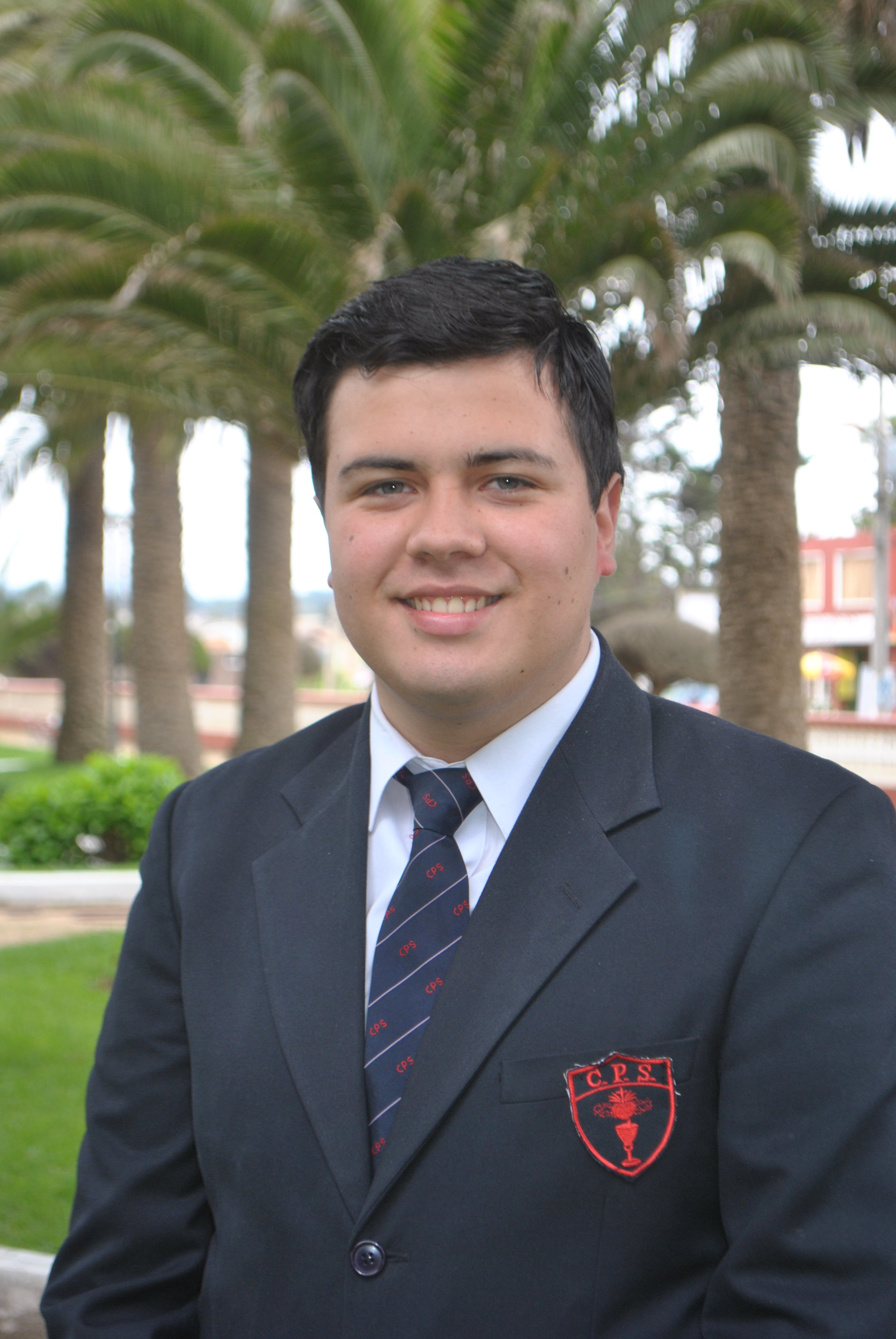 Diego Grez Cañete, presidente del Centro de Alumnos del Colegio de la Preciosa Sangre de Pichilemu durante el año escolar 2012. Foto oficial.